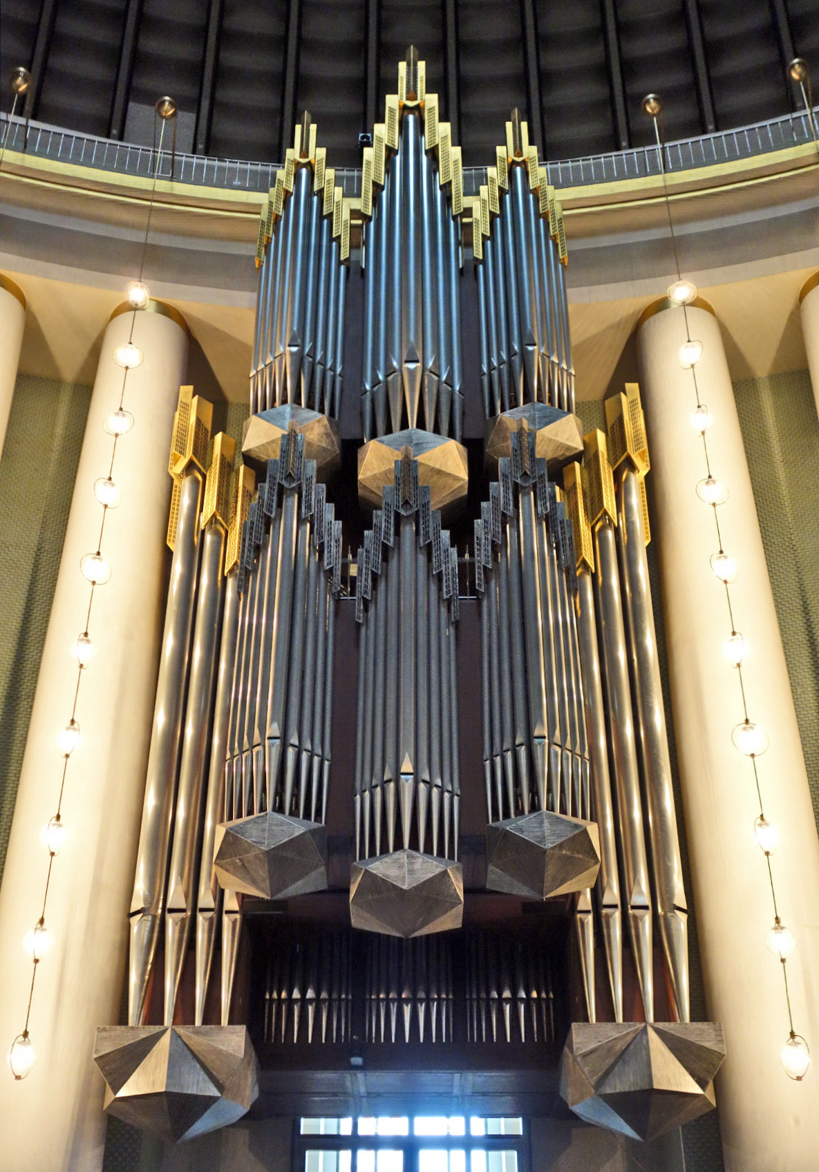 Orgel der Hedwigskathedrale in Berlin